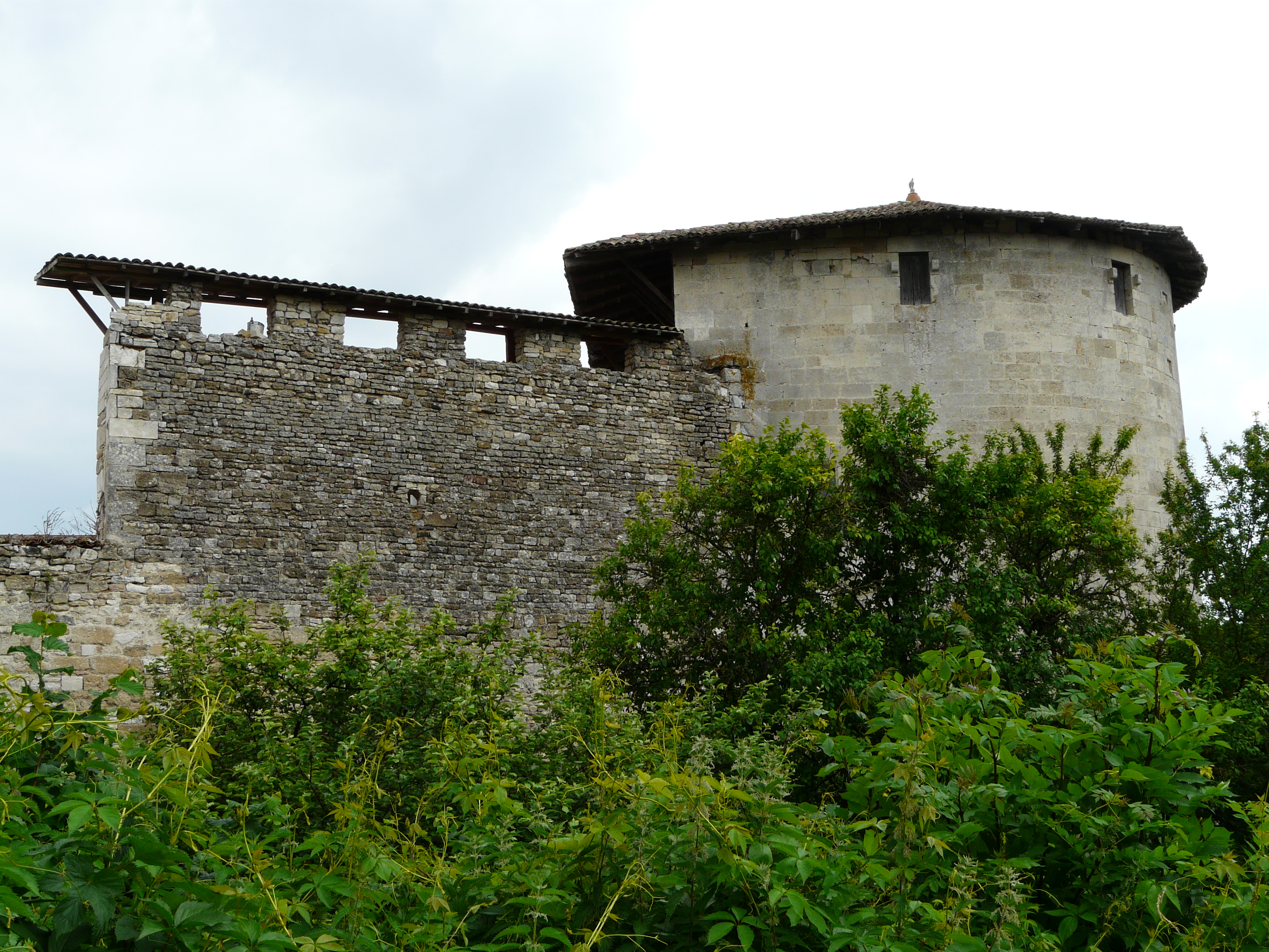 La tour aux Pigeons, vestige du château disparu de Void (Meuse, France).